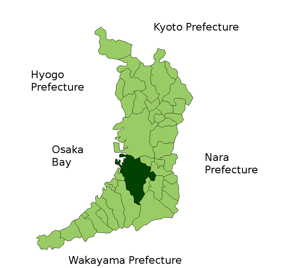 Location Map of Sakai in Osaka-fu, Japan